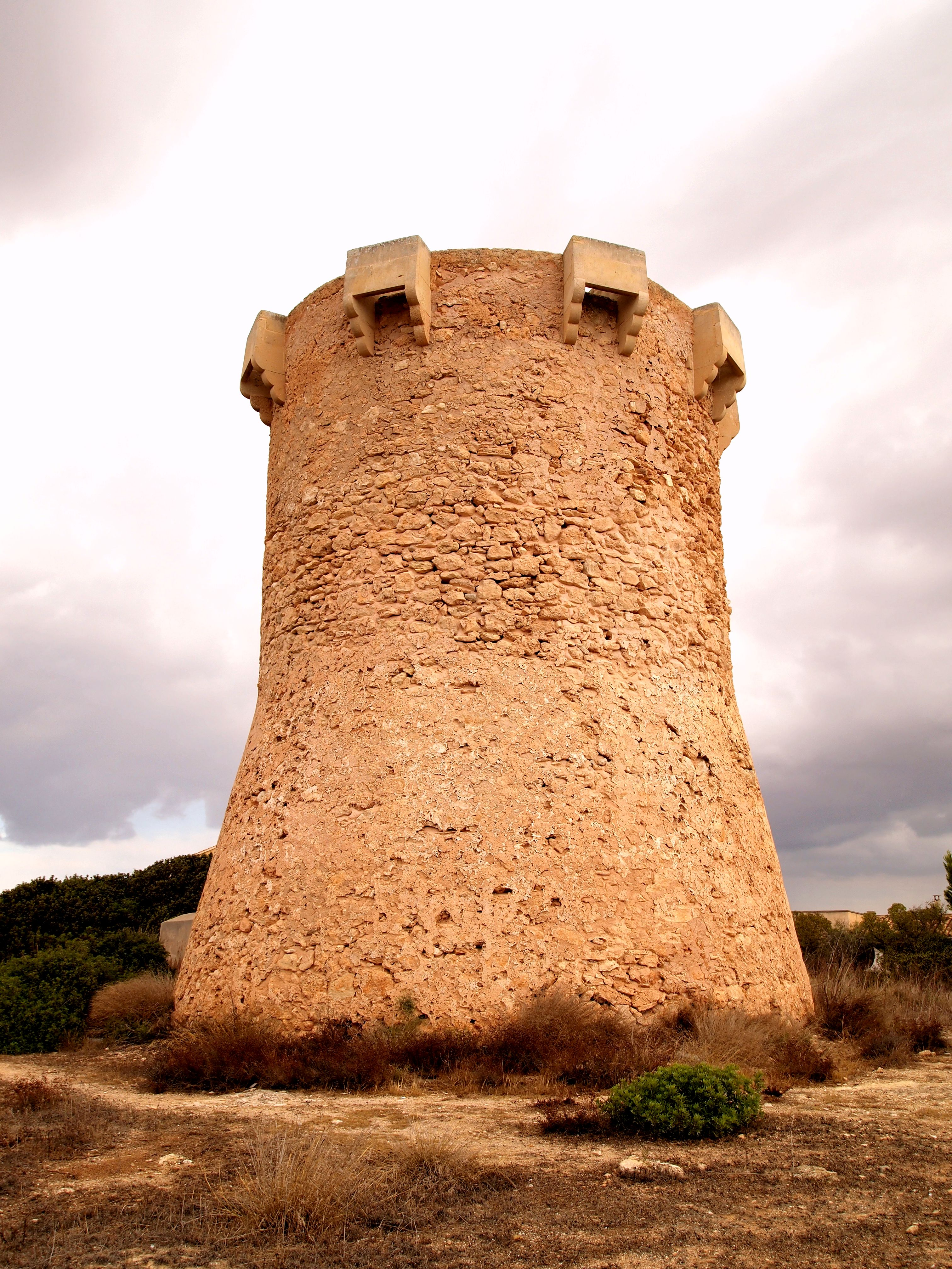 Torre de vigilància situada a la costa sud de Mallorca, a la població de Sa Ràpita (Campos, Balears, Espanya).